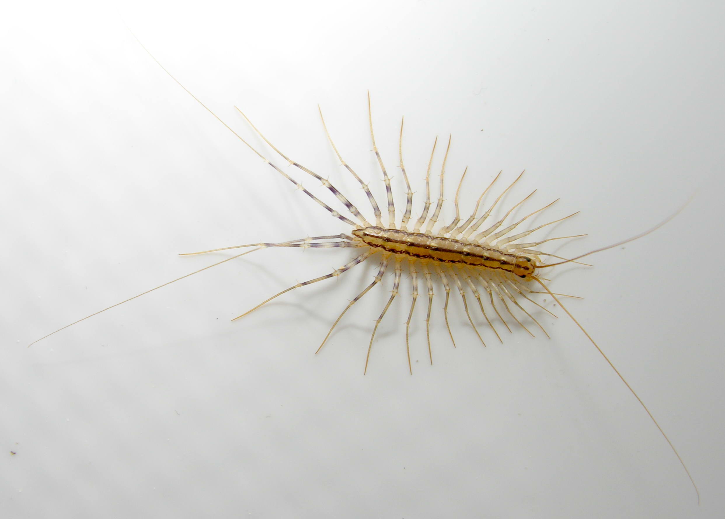 Scutigera coleoptrata Foto relalizada na fronteira galega con Portugal